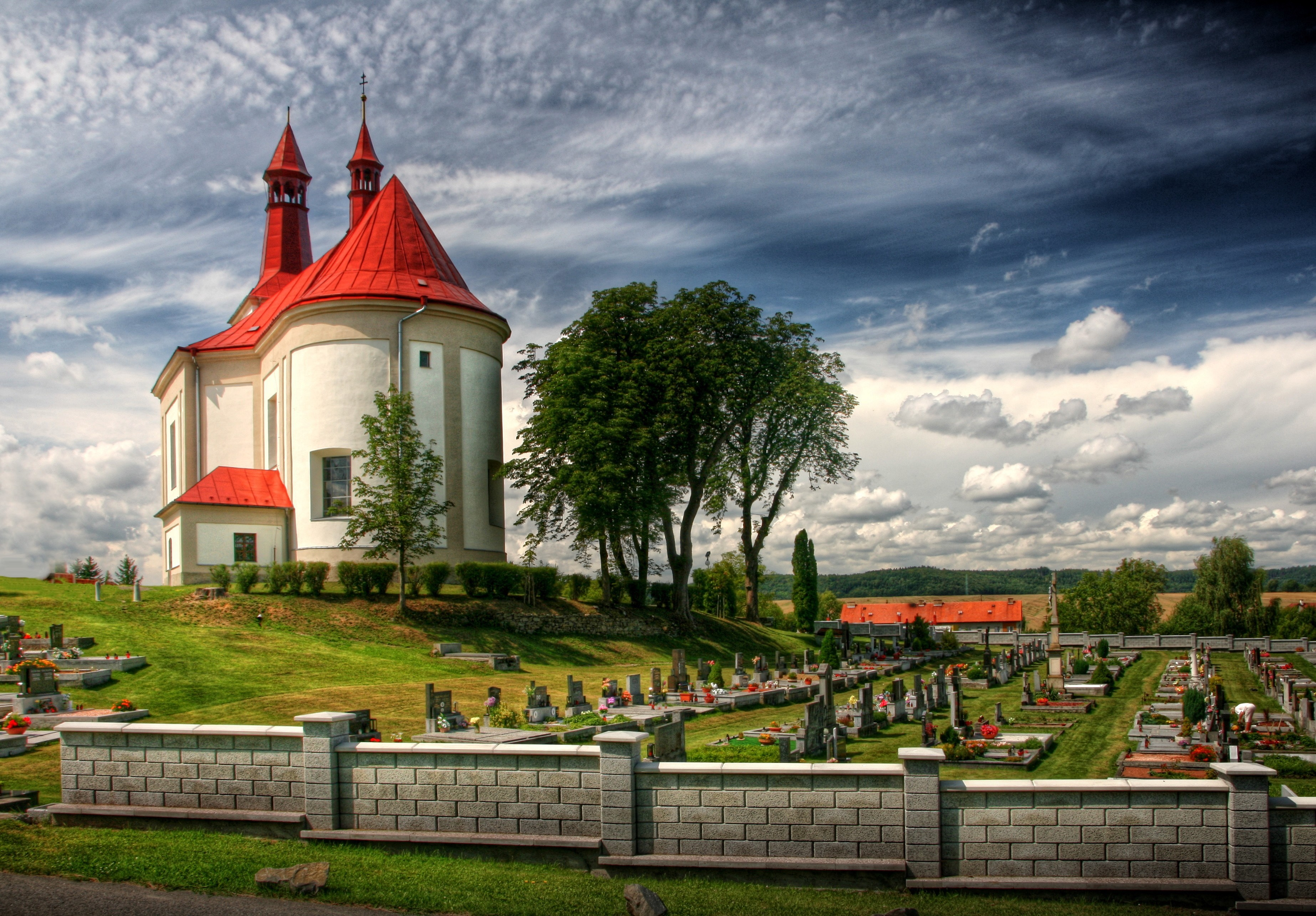 Kostel svatého Jiří, Bělotín.